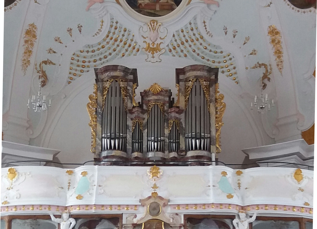 Siemann-Orgel in der Frauenkirche Günzburg